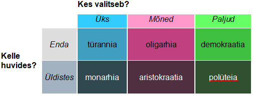 Aristotelese režiimide liigitus